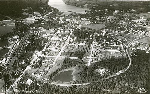 Ludvikas nyanlagda stadsplan